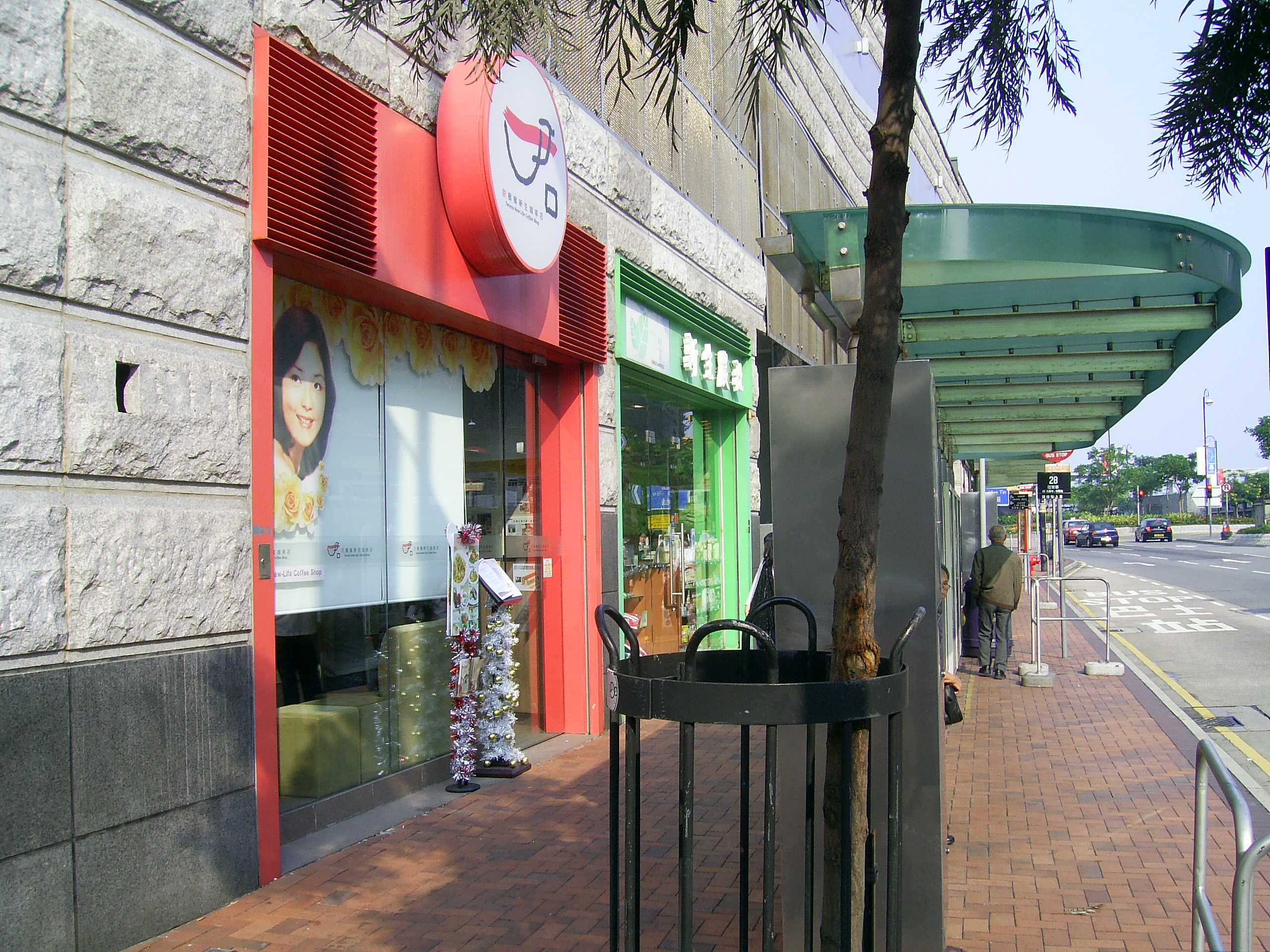 中文（香港）: 中間道兒童遊樂場下的甜蜜蜜新生咖啡店